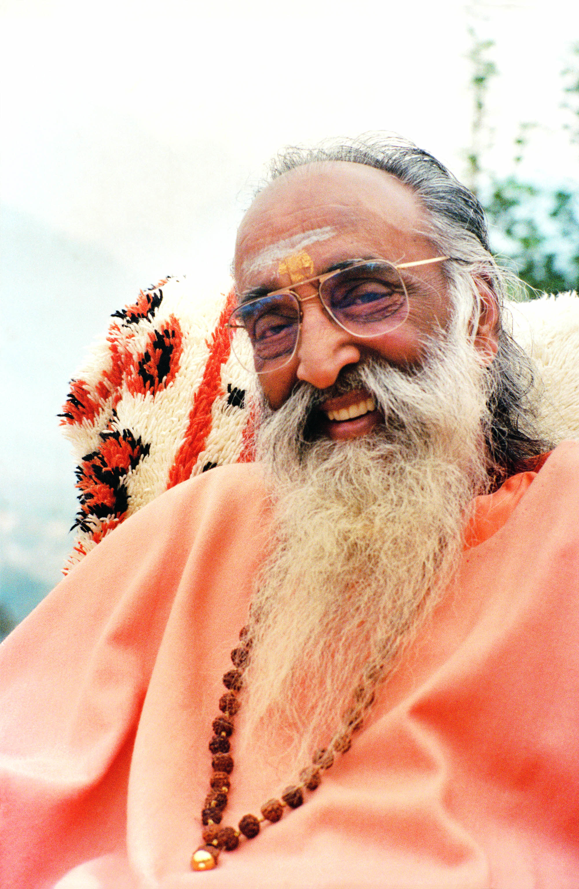 Portrait de Swami Chinmayananda